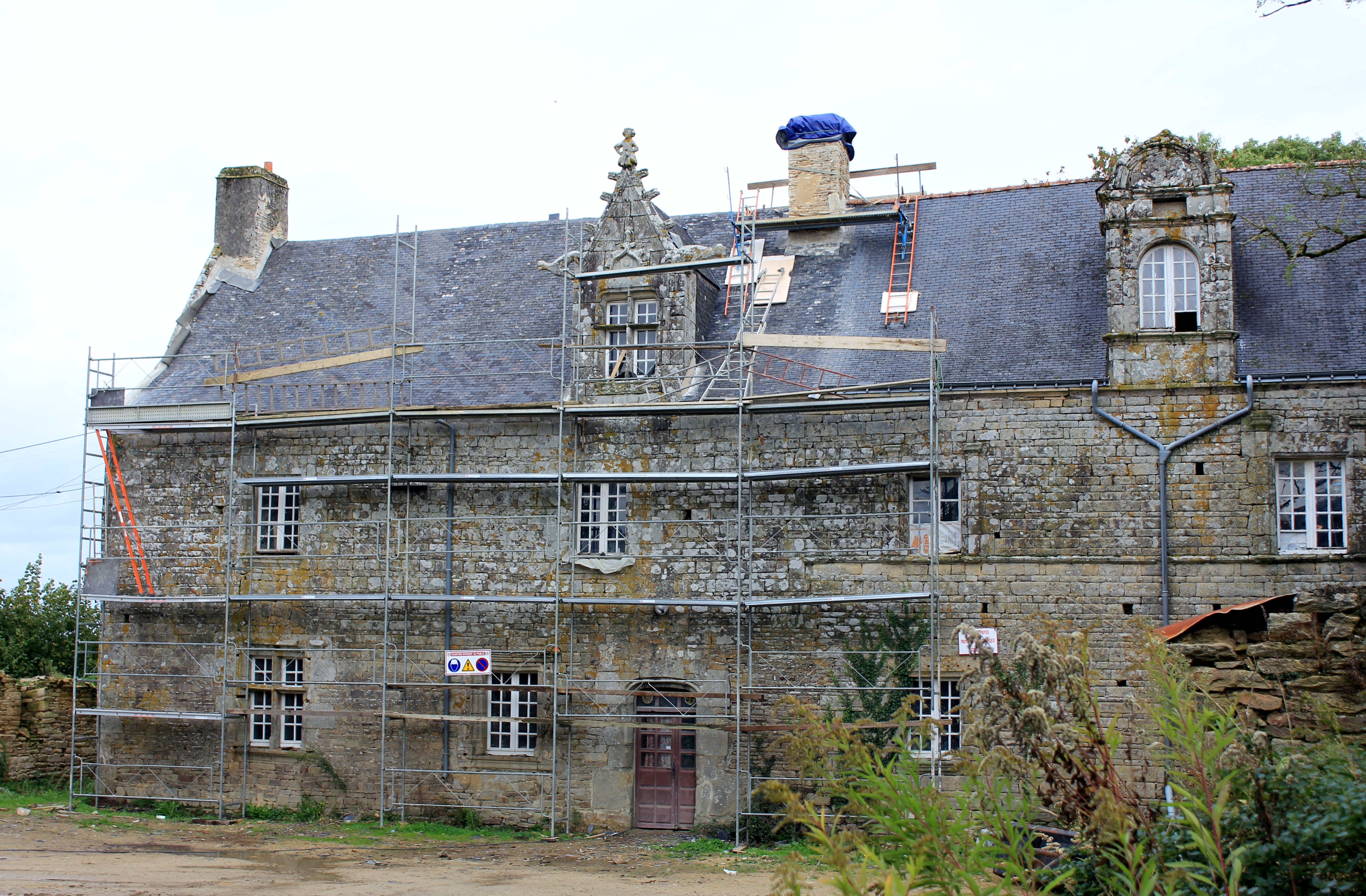 Manoir de Kergal